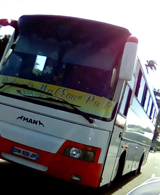 Un Man Acev Stylus aux Abymes (Guadeloupe)